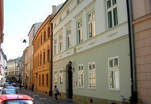 Widok na budynki Wydziału Polonistyki UJ przy ulicy Gołębiej 14,16 i 18.